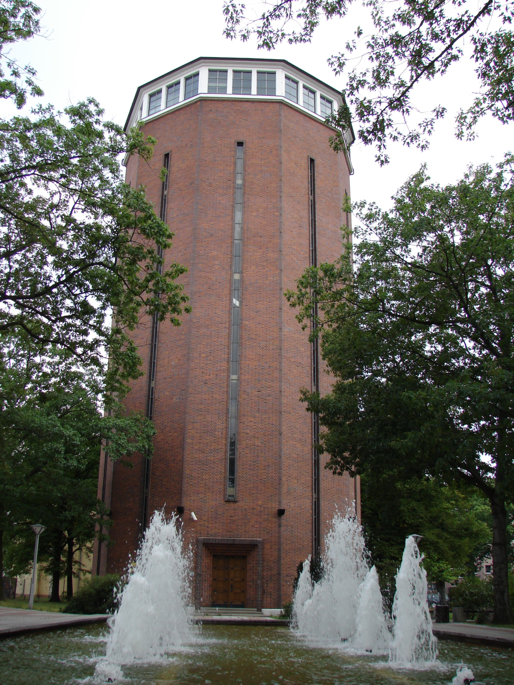 Wasserturm der Stadt Weißwasser und Wahrzeichen